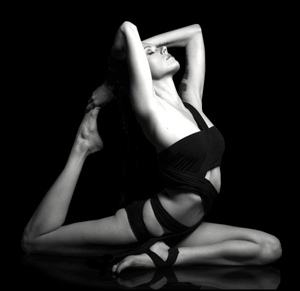 Raja Kapotasana by Nina Mel, Yoga Teacher